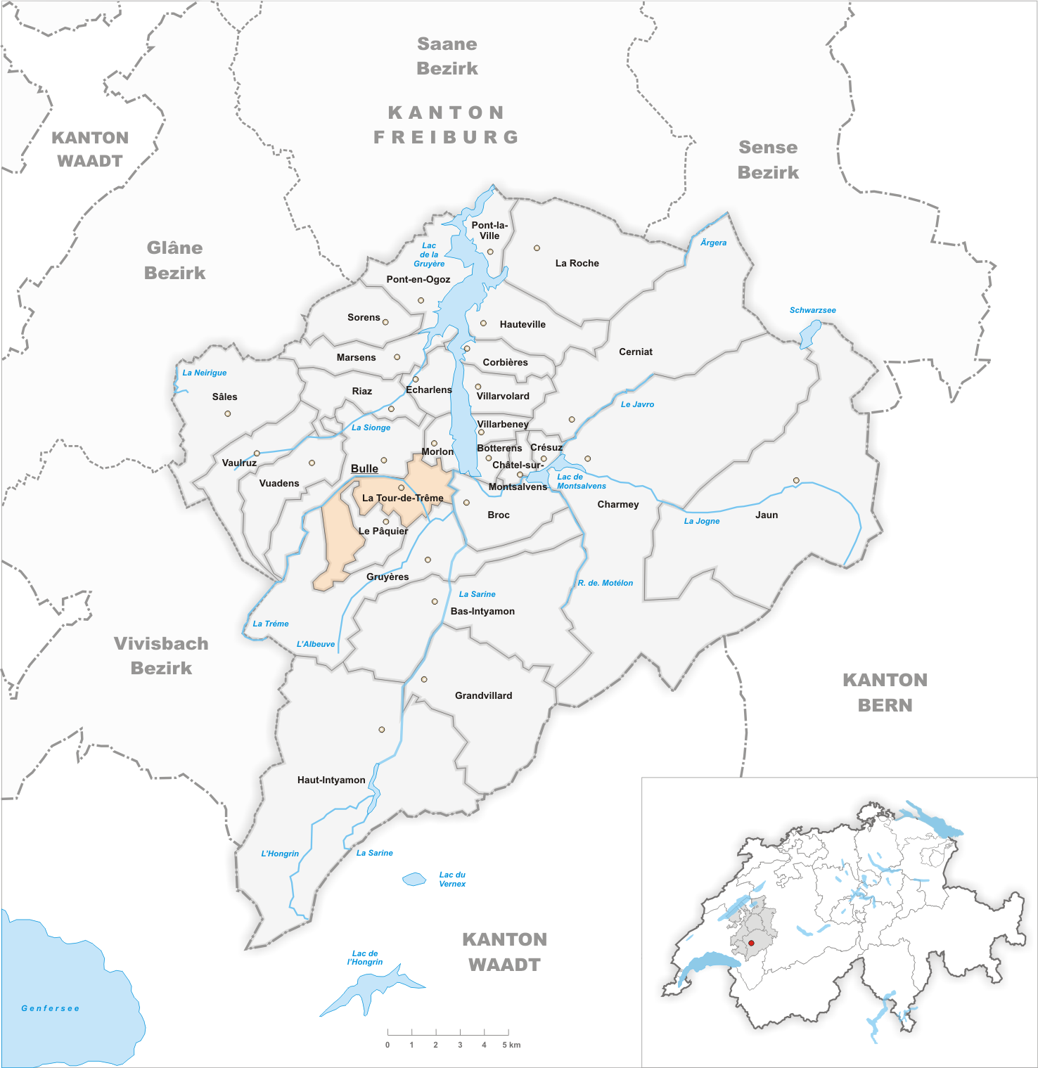 Municipality La Tour-de-Trême Artist: Tschubby